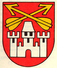 Wappen von Finhaut Kanton Wallis Schweiz